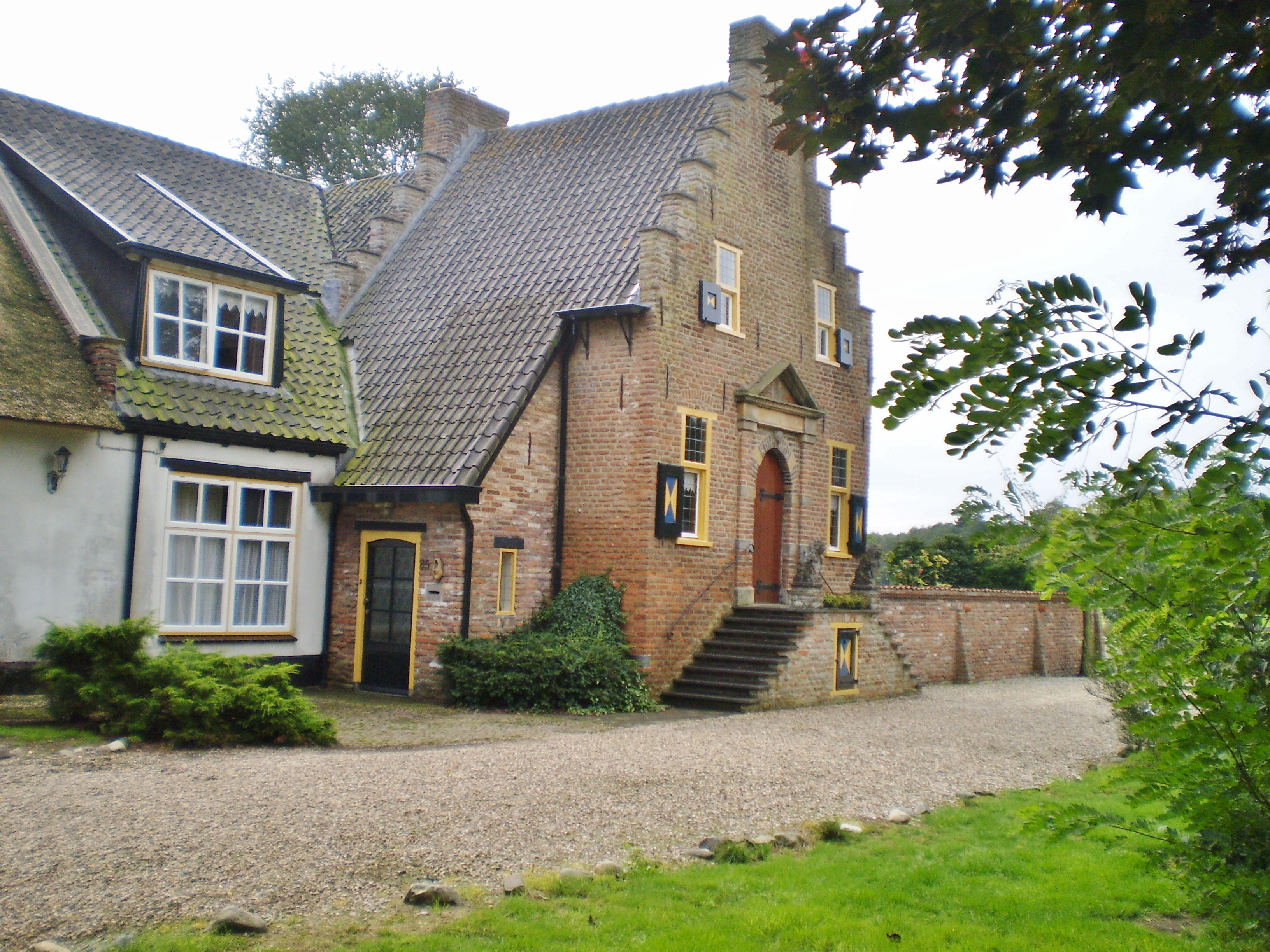 Schevichoven in Leersum 2011